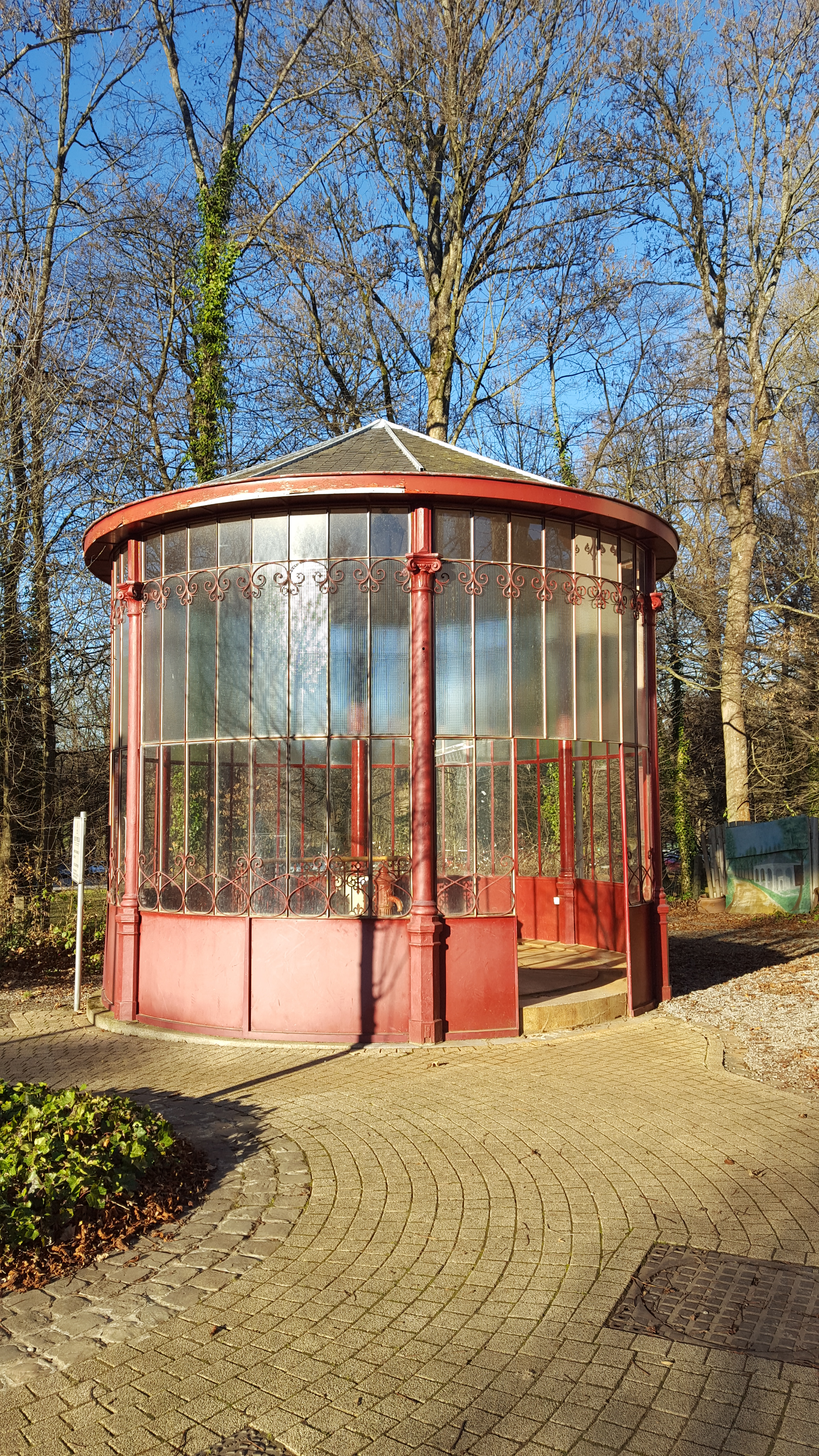 Source du Tonnelet, Nivezé, Spa, Belgique